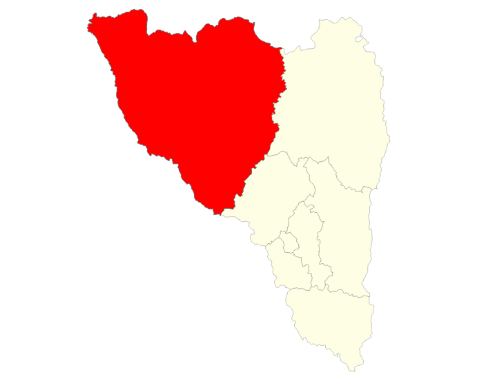 Localisation du district d'Ankazobe dans la région Analamanga